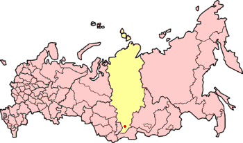 Location of Ačinsk in Krasnojaskij Kraj